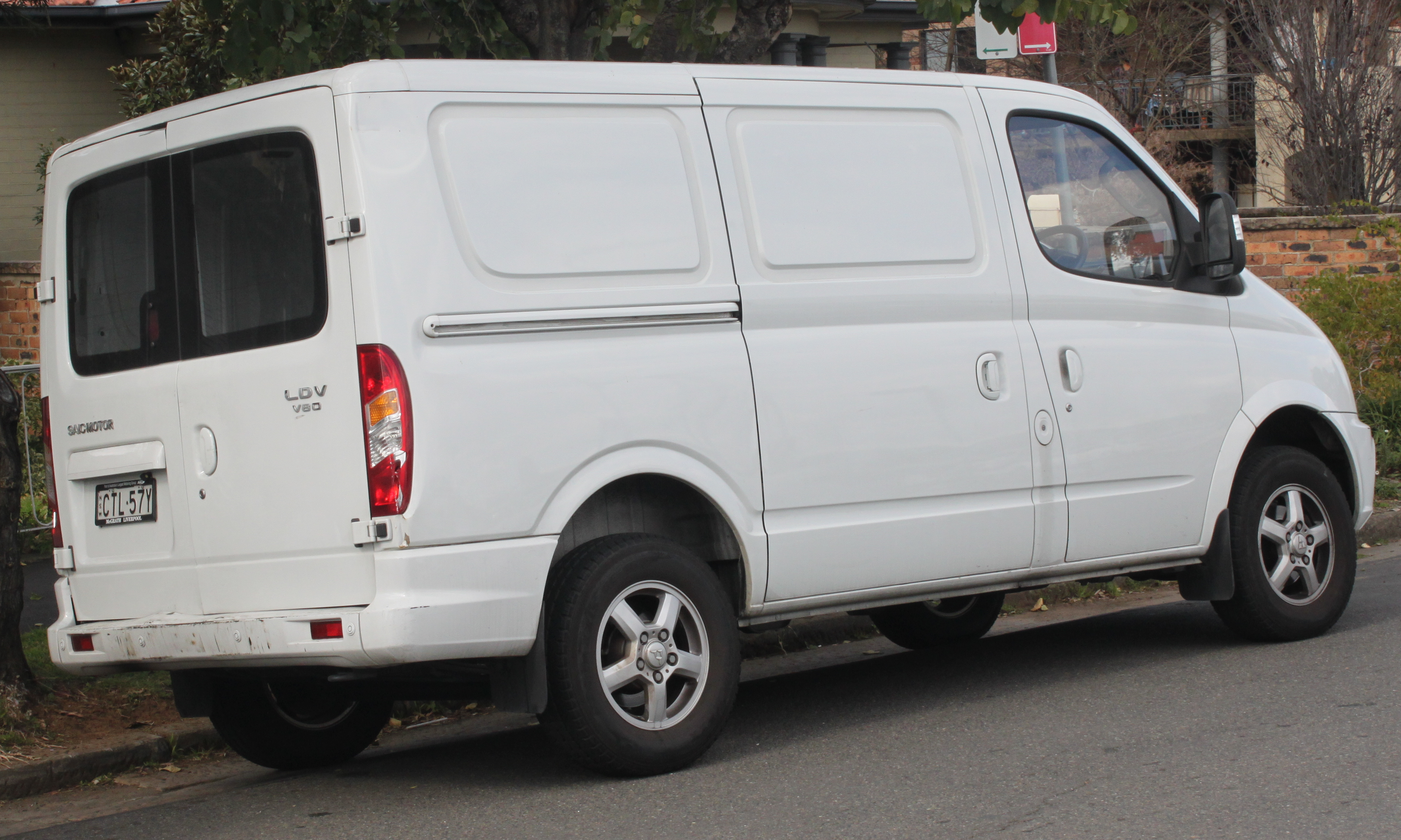 LDV V80 SWB Van